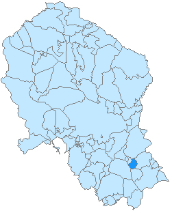 Mapa de Zuheros en la provincia de Córdoba, Andalucía, España.